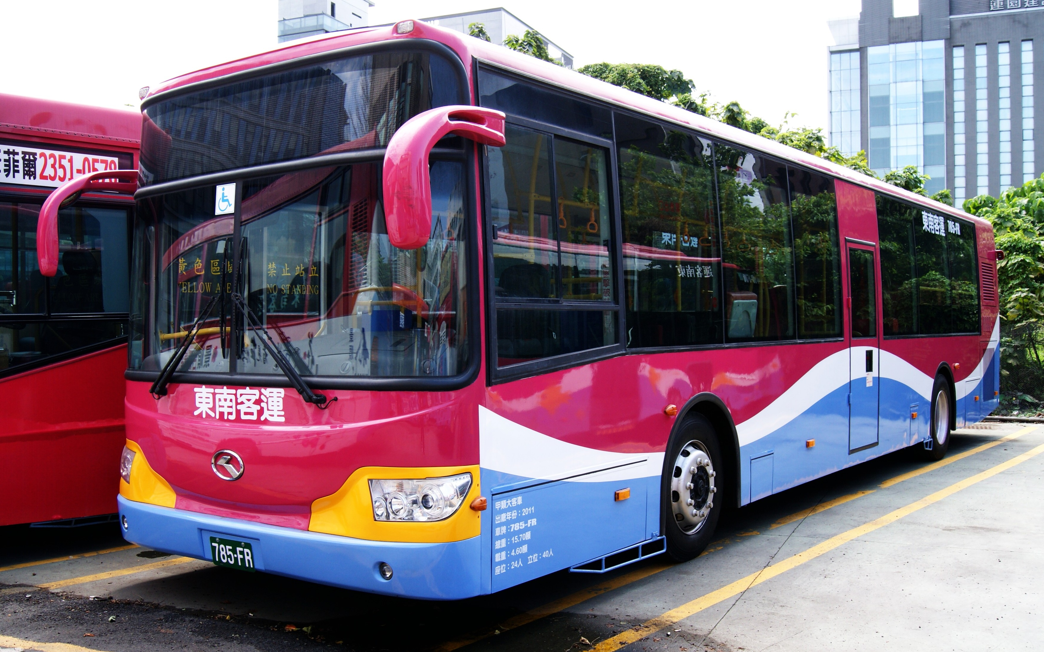 東南客運三陽金龍低地板公車785-FR